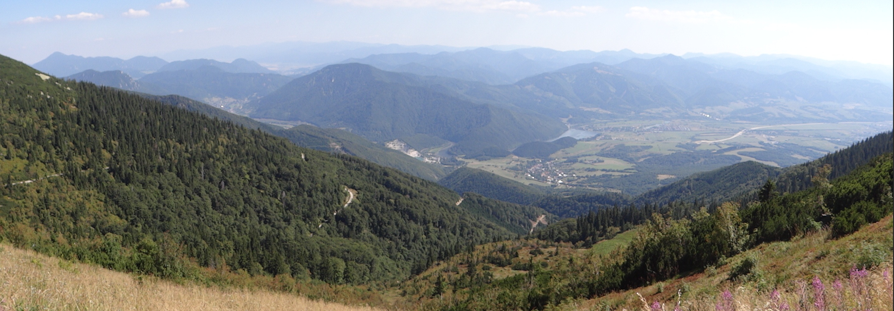 Turčianska kotlina